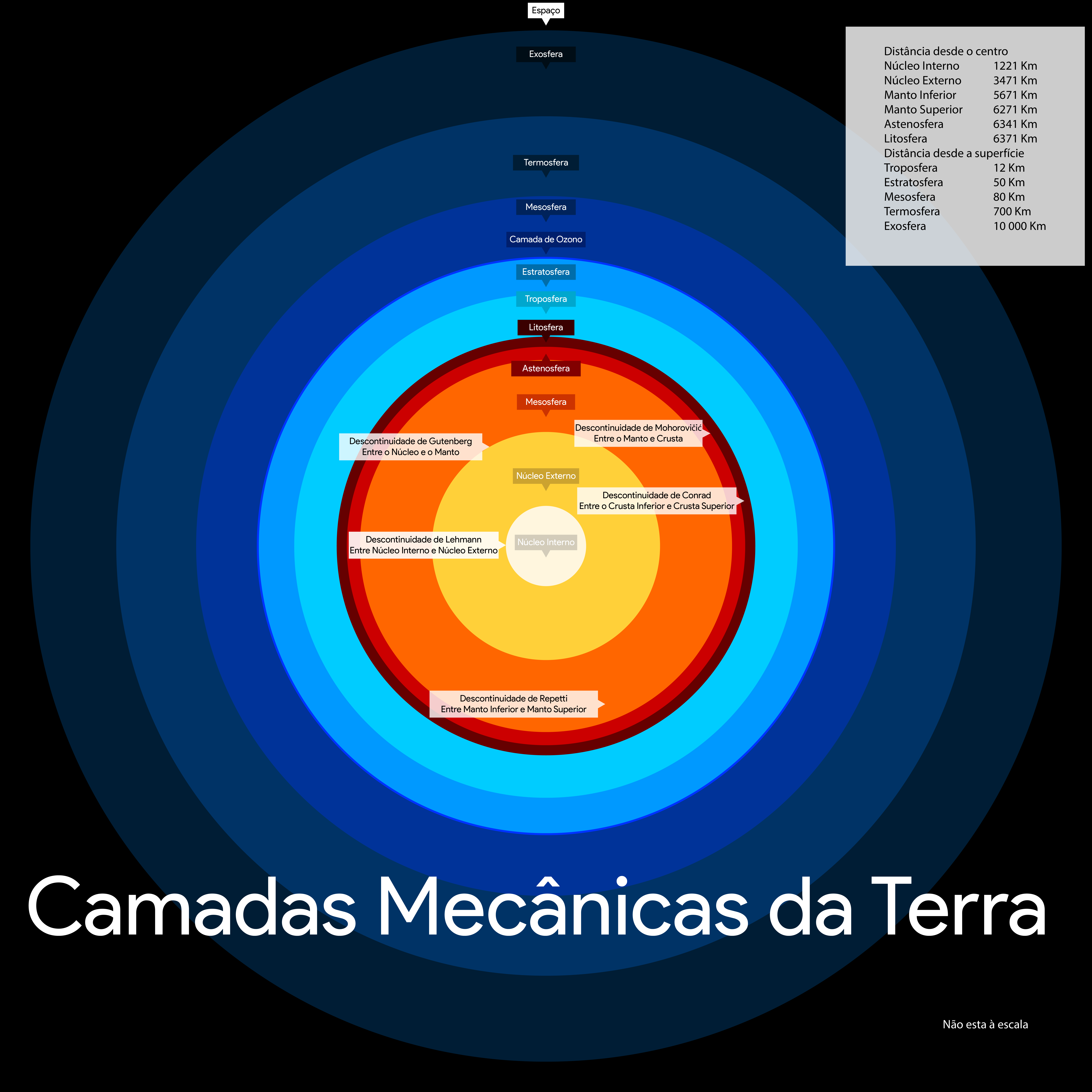 Camadas Mecânicas da Terra não está à escala e os seus tamanhos